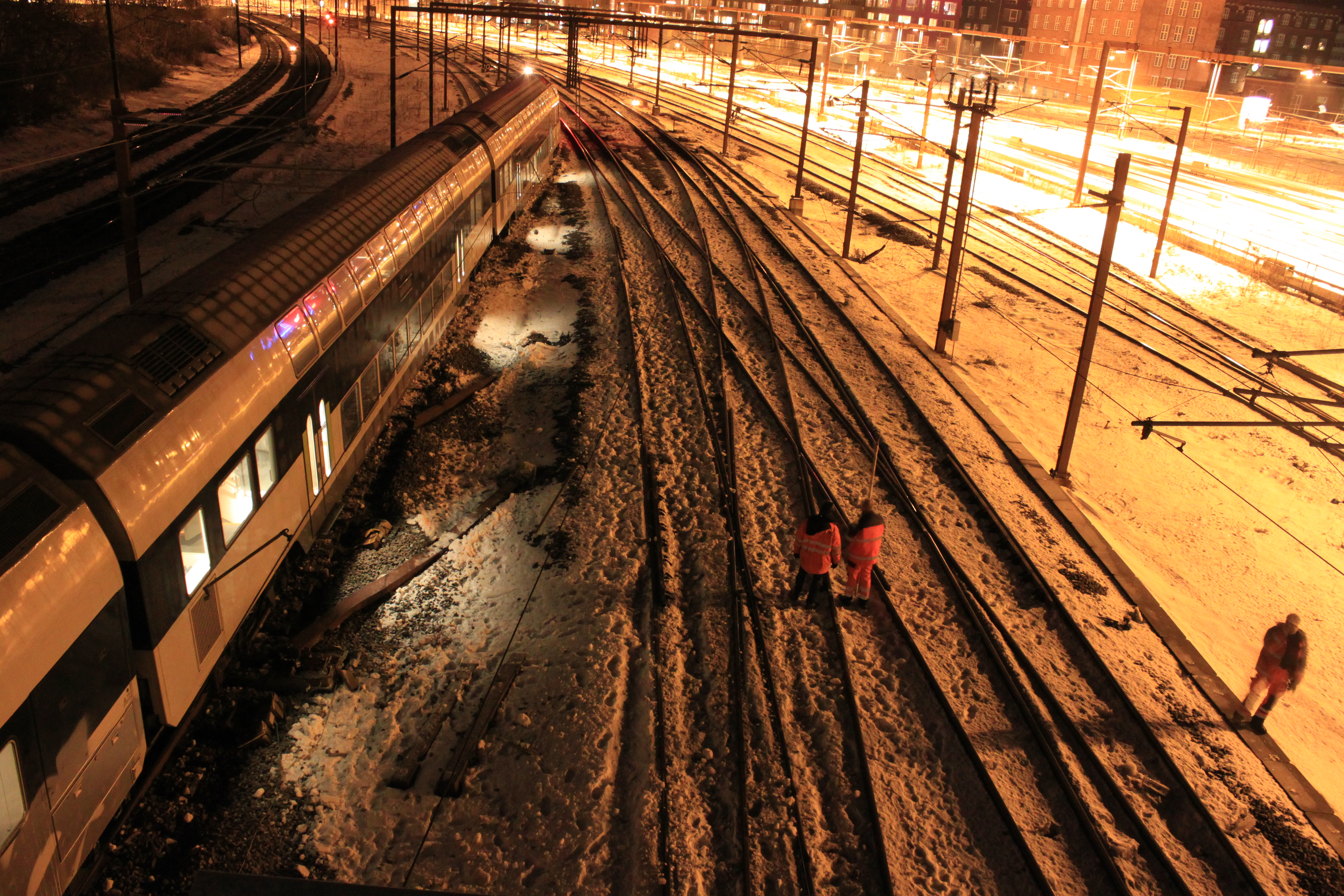 Afsporing af kystbanetog nord for Østerport station. Set fra Langeliniebroen mod nord.